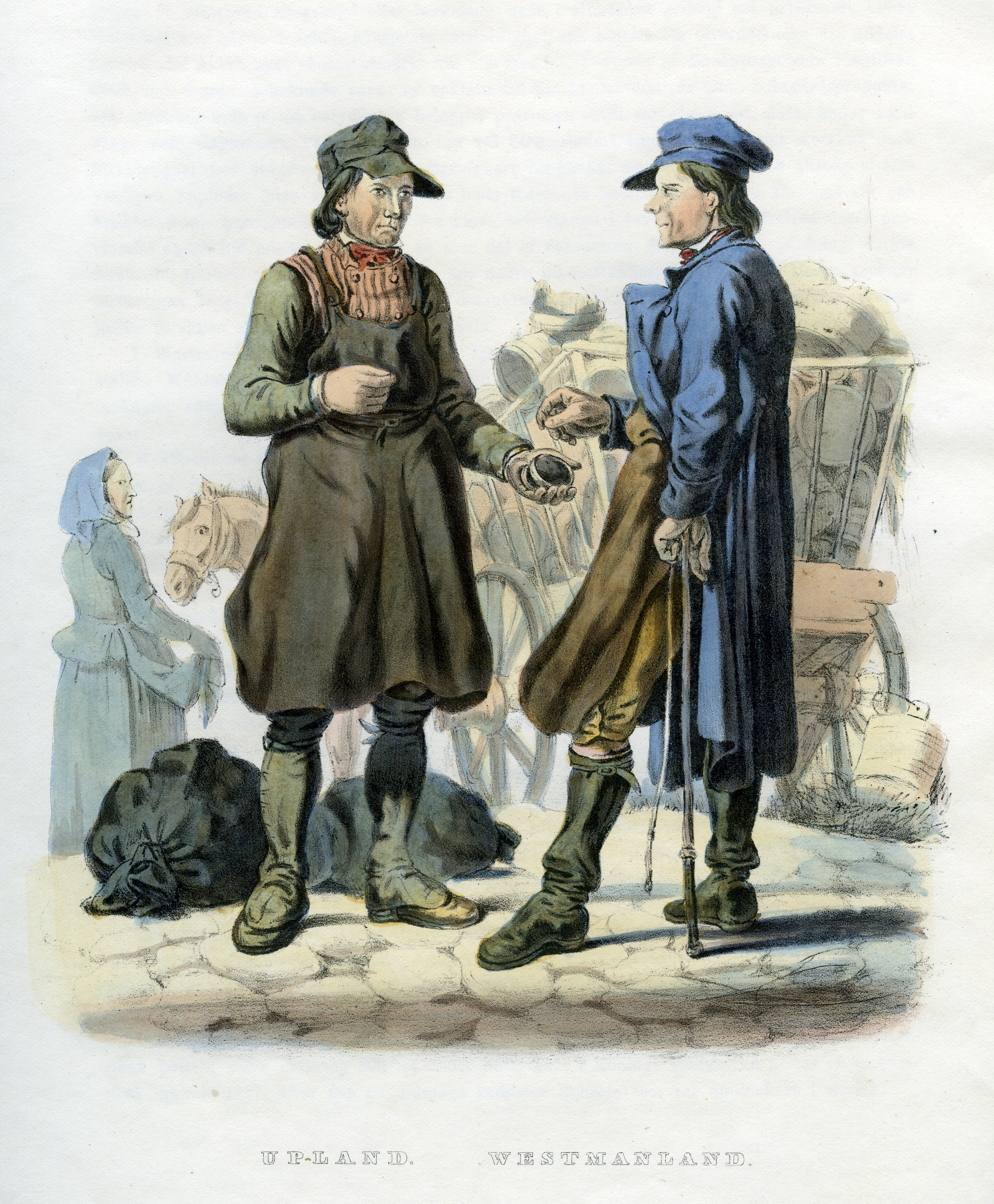 Folkdräkter från Uppland och Västmanland, Sverige. Plansch ur Svenska folkets seder, bruk och klädedrägter (1863) tecknad av Carl Anders Dahlström.